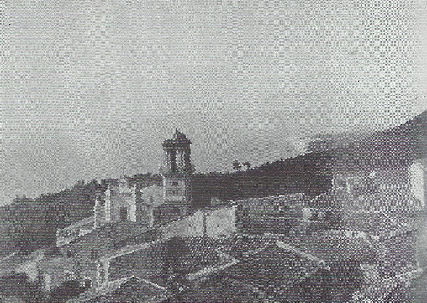 Antica Chiesa di Maria Santissima del Carmelo di Palmi, danneggiata dai terremoti del 1783 e 1894 e definitivamente distrutta dal terremoto del 1908